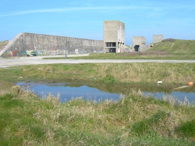 Treguennec le camp TODT vue de la carrière communale. Cette dernière est aujourd'hui remplie d'eau